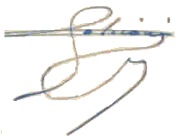 SIGNATURE OF SIMON SABIANI